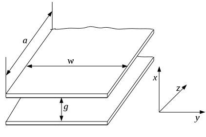 Linia przesyłowa składająca się z dwóch pasków